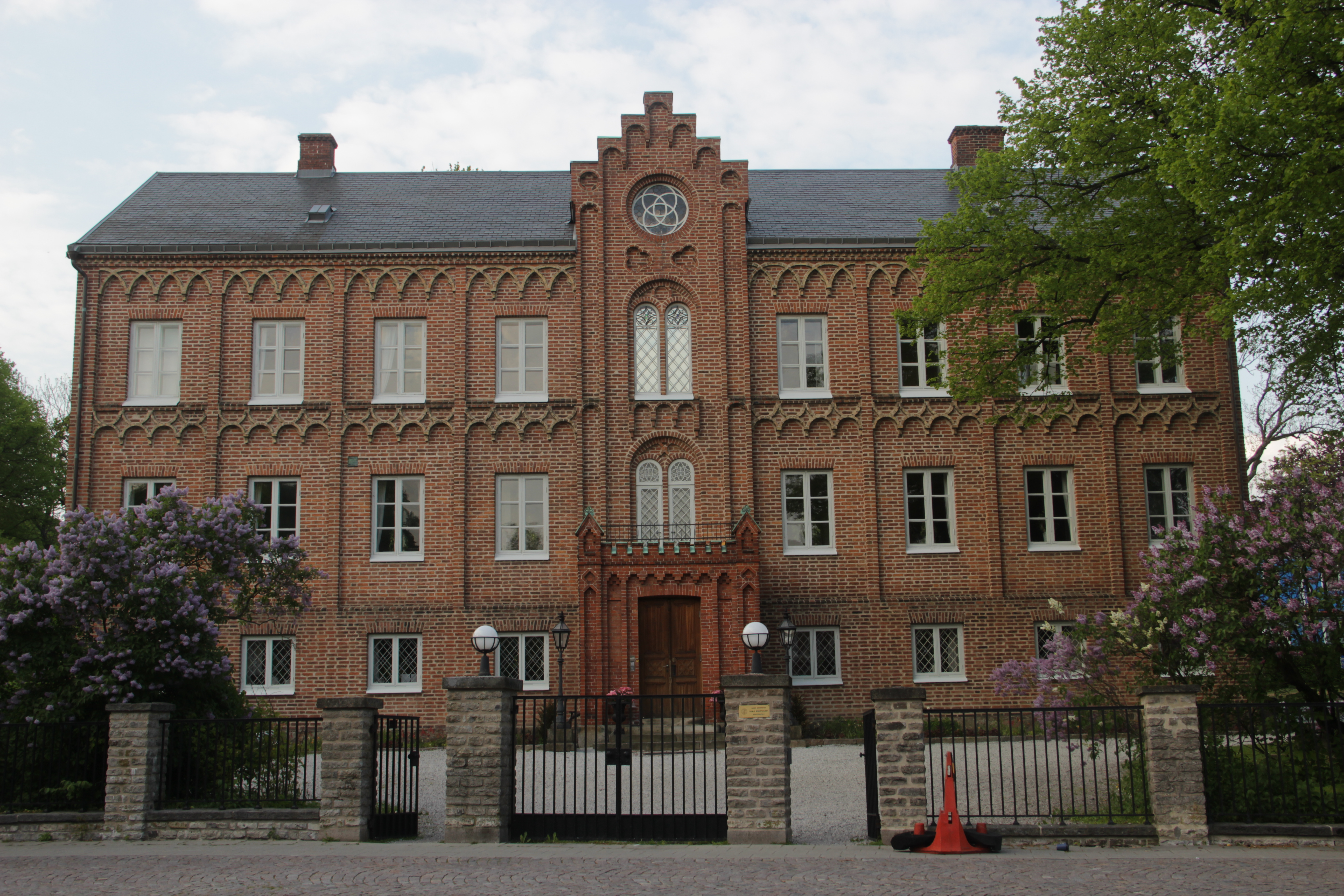 Gamla Biskopshuset